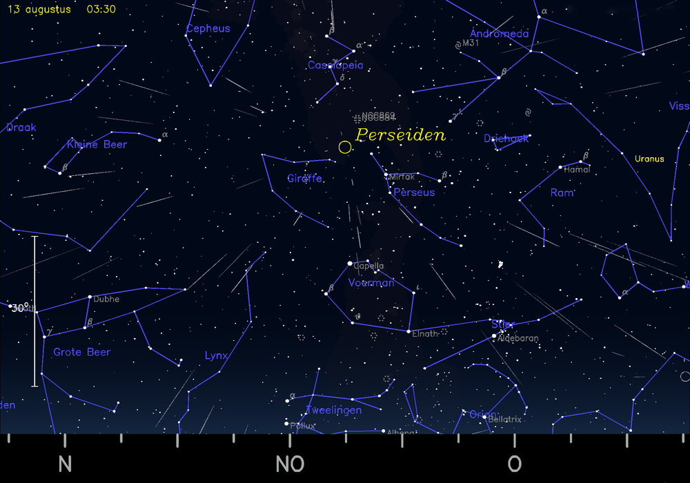 Hemelkaartje van de meteorenzwerm Perseiden op 13 augustus 2015 om 3:30 uur MEZT, het beste moment om de meteoren waar te nemen dat jaar.